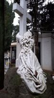 visione posteriore della scultura